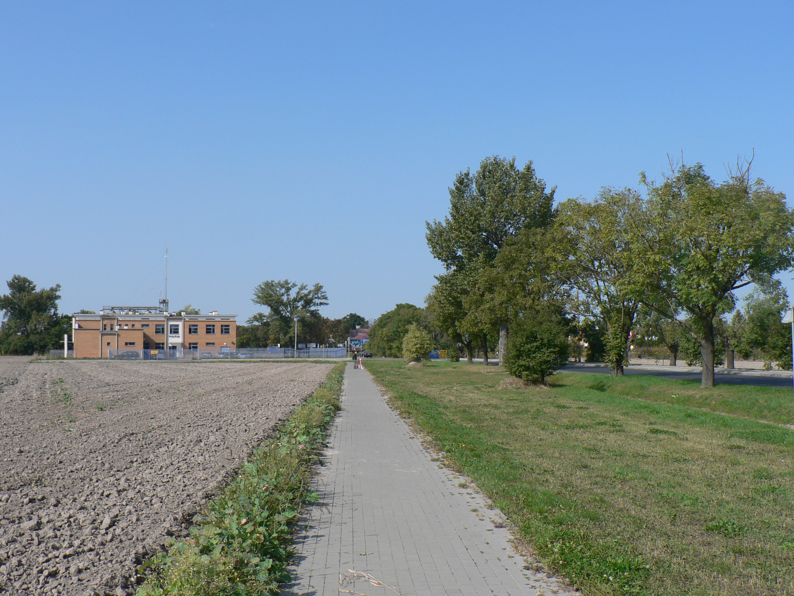 Ścieżka rowerowa i posterunek policji w Regułach